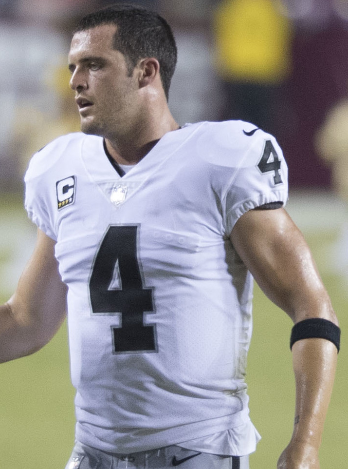 Raiders at Redskins 9/24/17